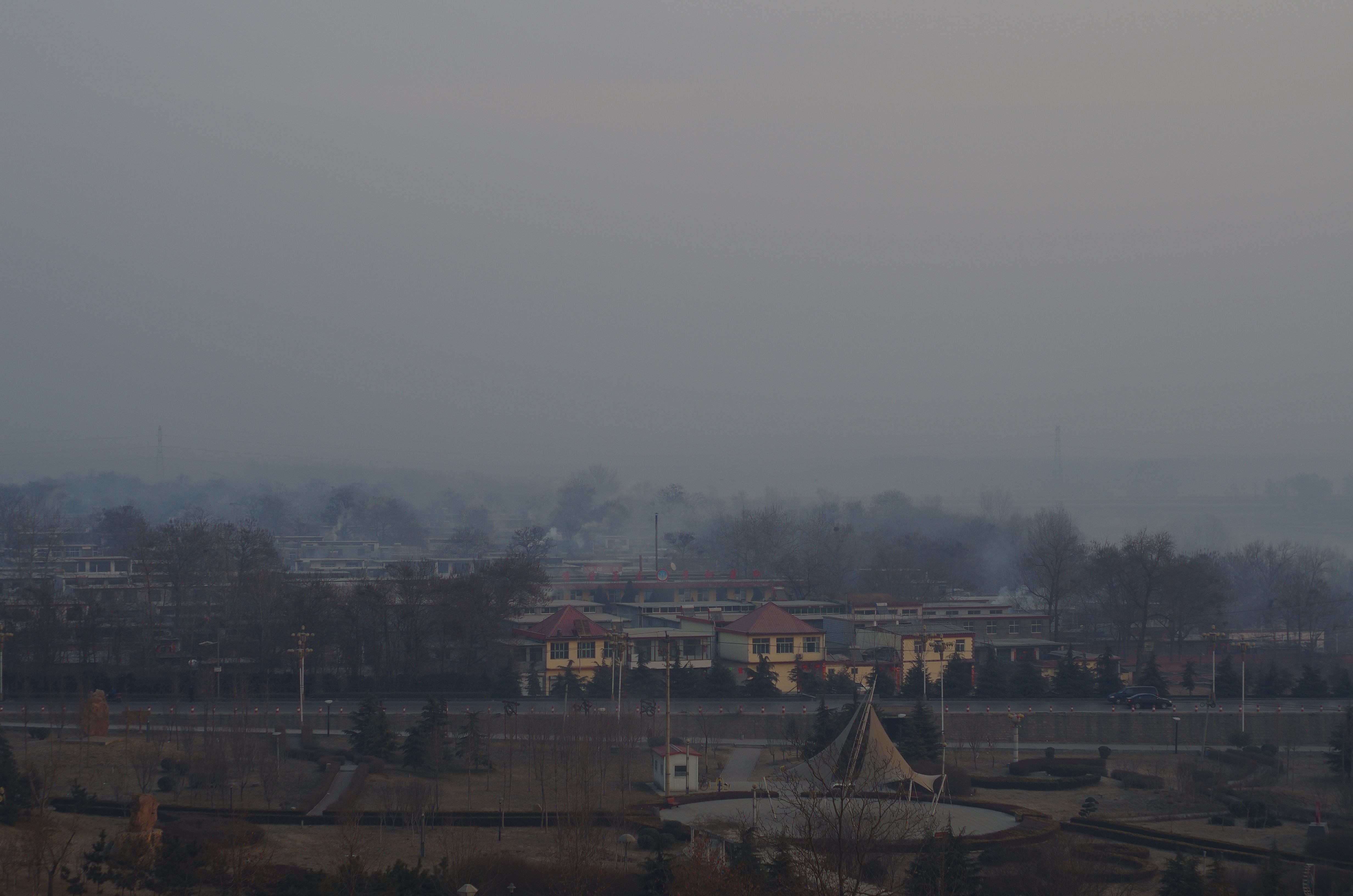 公园